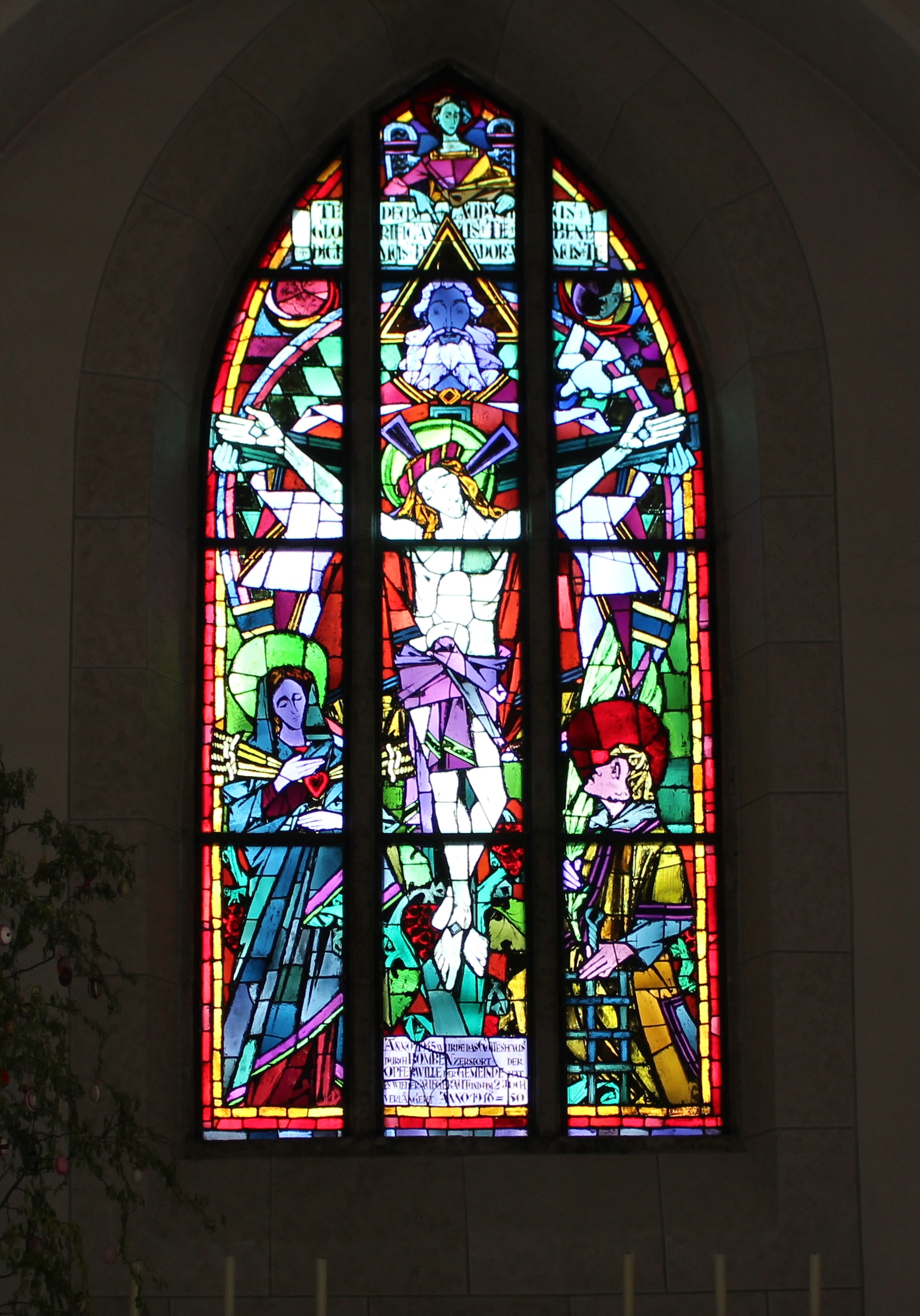 Kath. Pfarrkirche St. Laurentius, Landkreis Kelheim, Niederbayern: Altarfenster